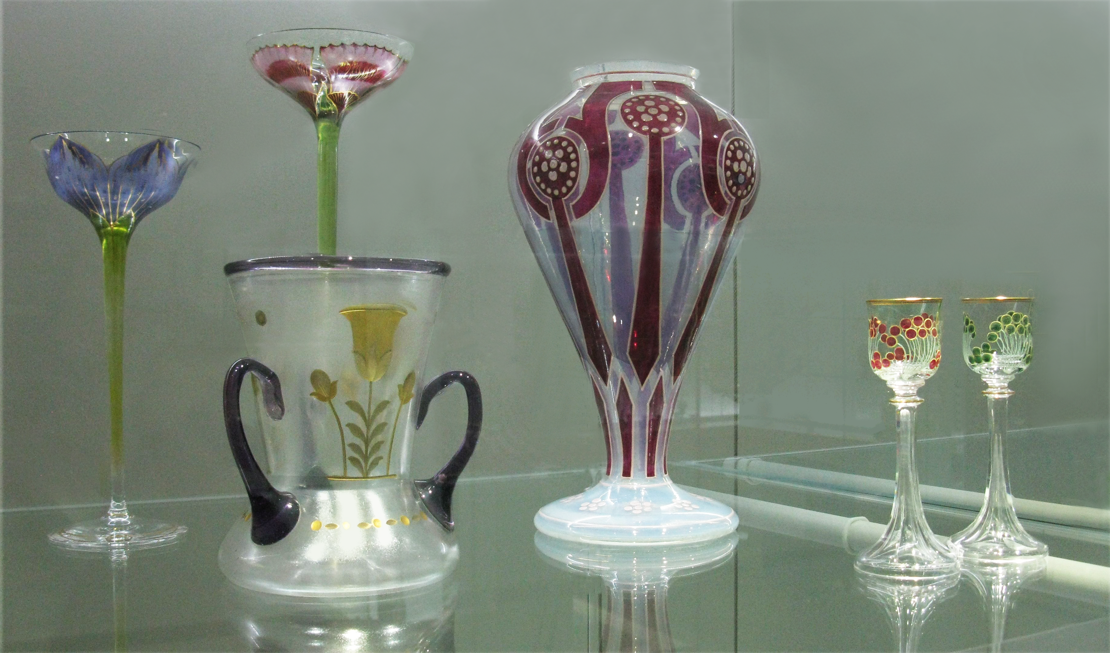 Gläser von Ludwig Sütterlin etwa 1900-1910 gestaltet. Aufgenommen im Museum Karkonoski in Jelenia Góra.